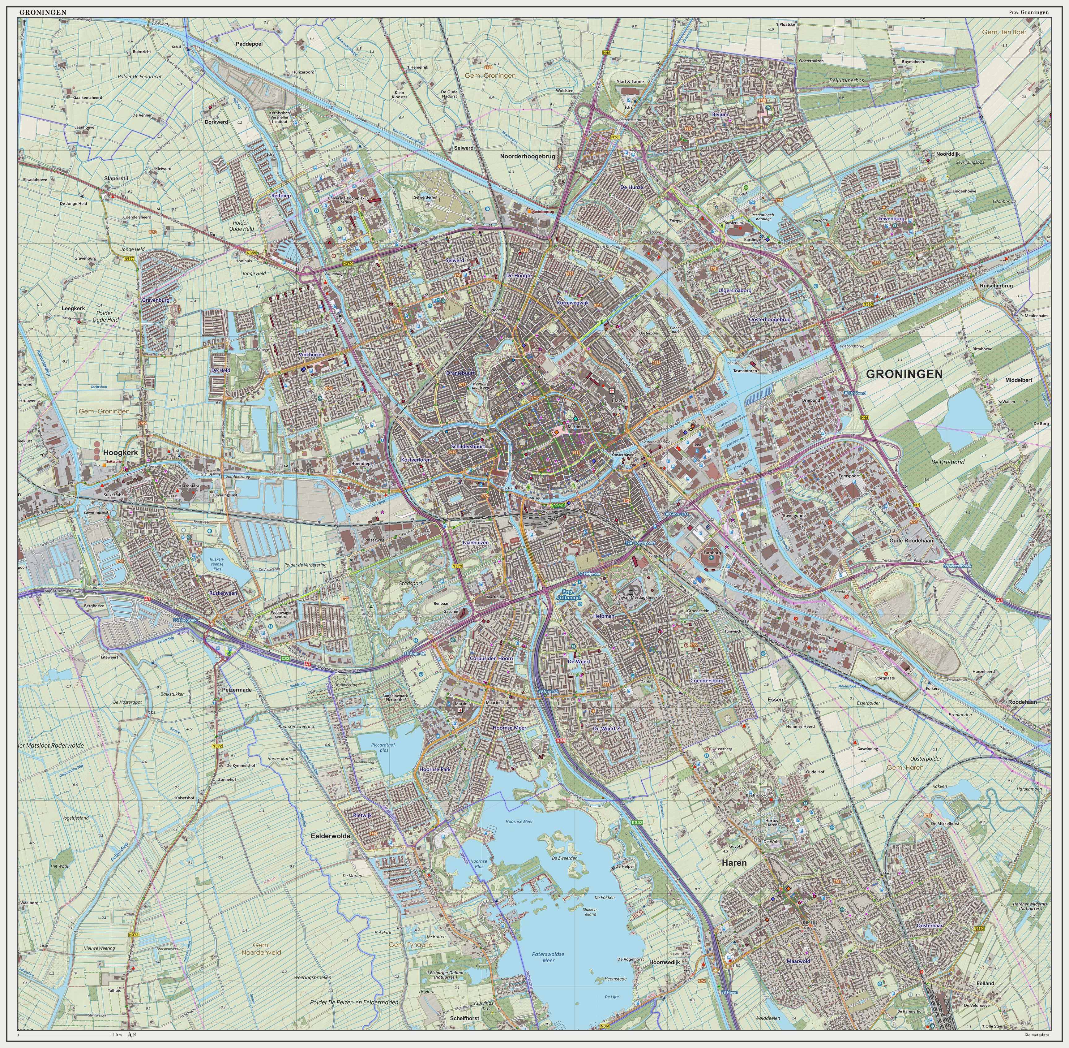 Topografische kaart van Groningen (woonplaats). Resolutie: 300 pixels/km. Kaartbeeld samengesteld uit de open geodata van de Top10NL en Top25namen (Basisregistratie Topografie, Kadaster), Creative Commons BY licentie. Gebouwvlakken uit open geodata BAG extract. Wegen uit de OpenStreetMap. Schaduwreliëf uit de Actuele Hoogtekaart AHN2. Samenstelling en kleurenschema: Jan-Willem van Aalst, met QGIS2. Zie ook de Legenda.